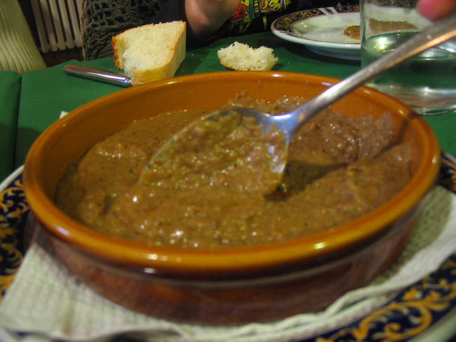 Ajopringue - Excursión nacimiento del río Mundo